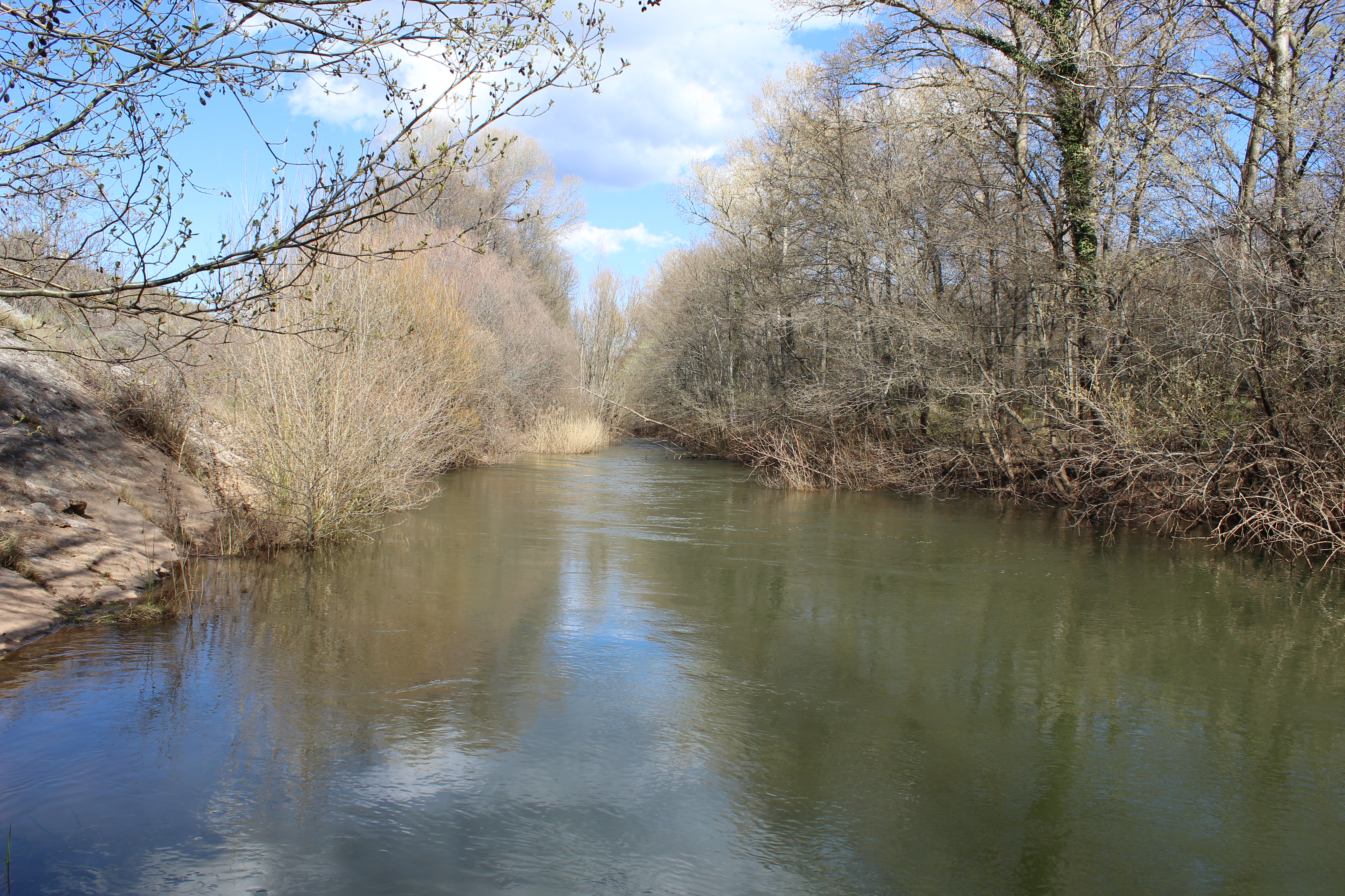 Río Jarama. Uceda/Patones.